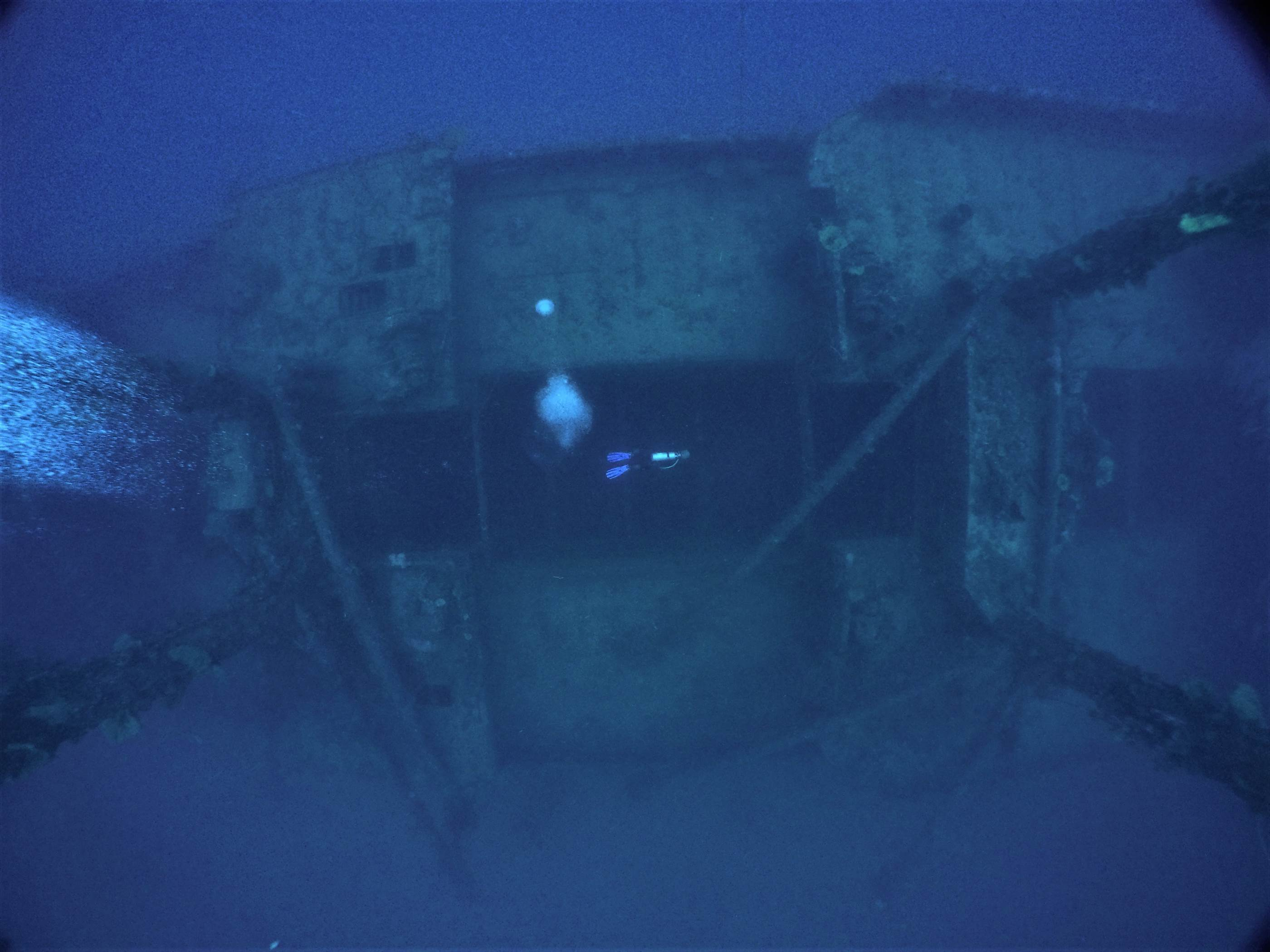 Aikoku maru